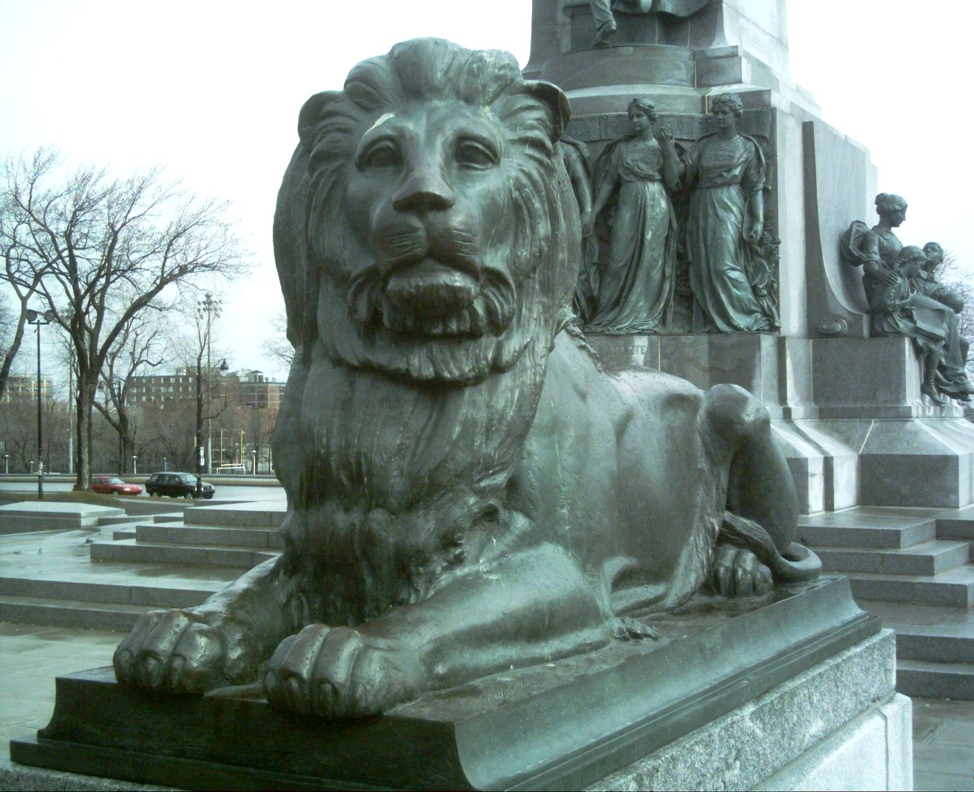 Un des quatre lions qui entourent le Monument à George-Étienne Cartier à Montréal